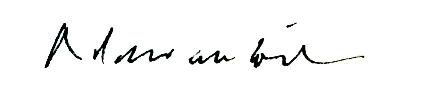 Signature de l'écrivain algérien Mohammed Dib, scan d'après livre dédicacé. Cette image ou le texte qui y est représenté est seulement composé de formes géométriques simples et de texte. Elle n’atteint pas le seuil d'originalité nécessaire pour la protection du droit d’auteur, et est donc du domaine public.